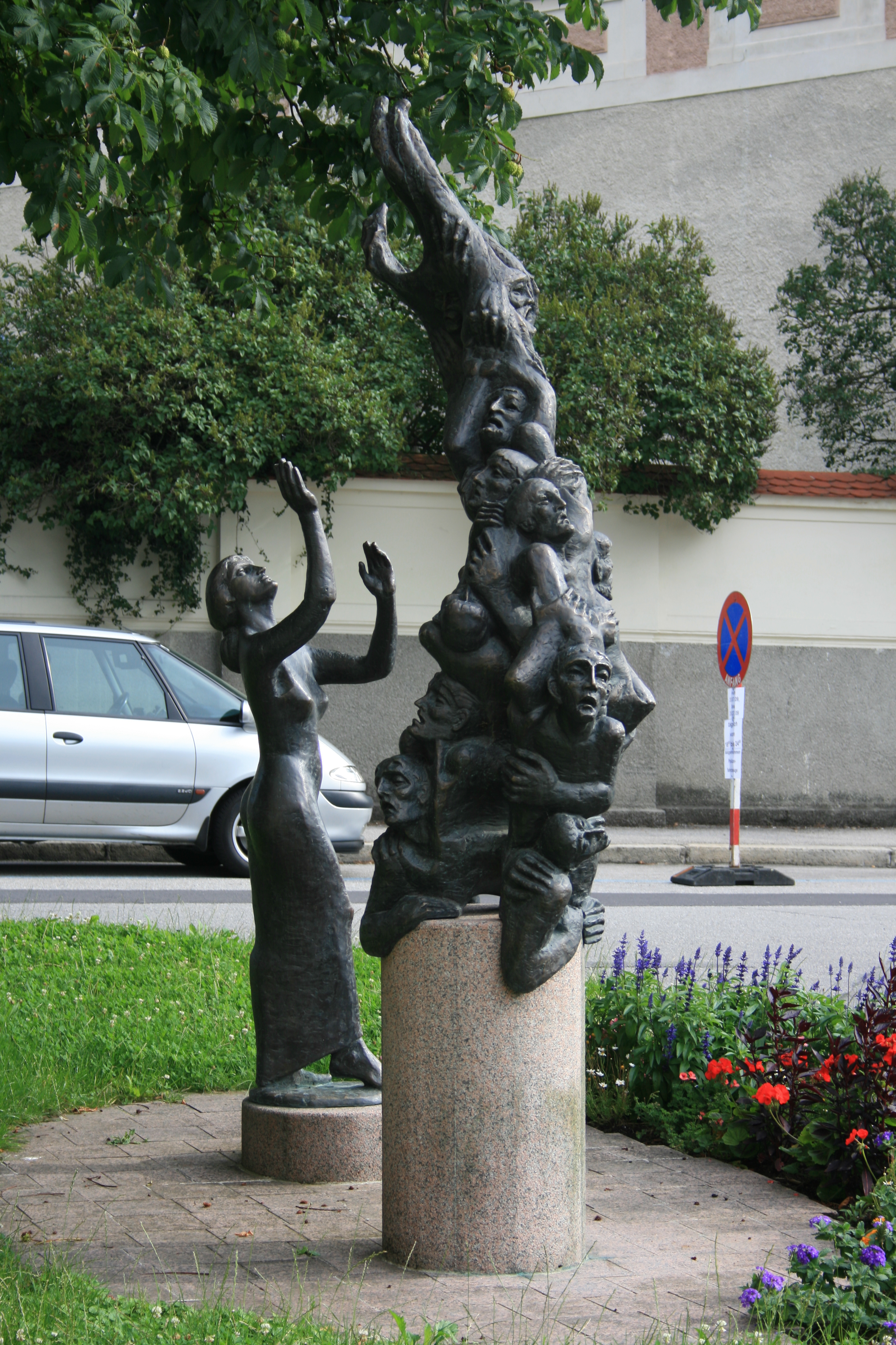 Das von Gerald Brandstötter entworfene Denkmal erinnert an die im Jahr 1397 unter Inquisitor Petrus Zwicker verbrannten Steyrer Waldenser. Es wurde 1997 am Prof.-Jörg-Reitter-Platz errichtet (Berggasse, Abzweigung Blumauergasse)